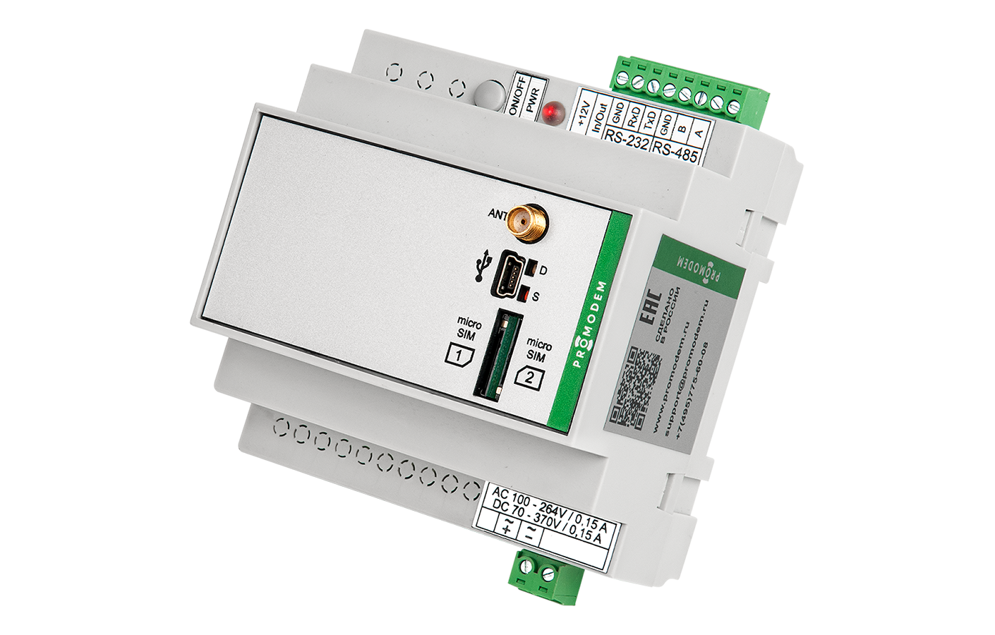 Модем PROMODEM GSM/3G со встроенным ИБП на 2 часа автономной работы самого модема и подключенного устройства